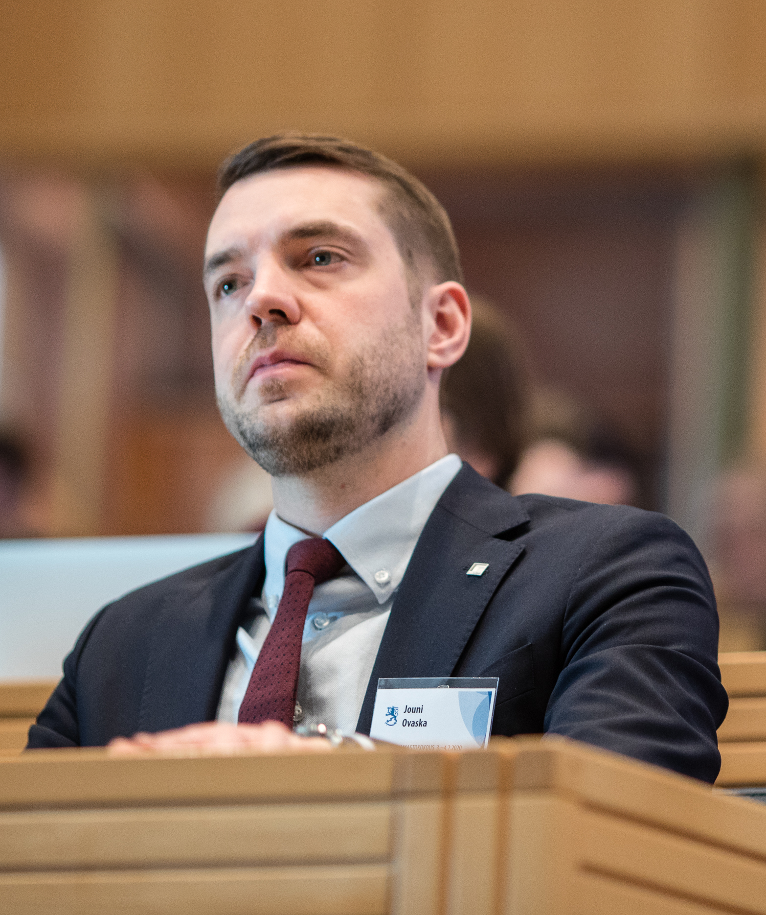 Hallitus ja hallituspuolueiden eduskuntaryhmät kokoontuivat yhteiseen ilmastokokoukseen Helsingin Vuosaareen. © Laura Kotila | valtioneuvoston kanslia